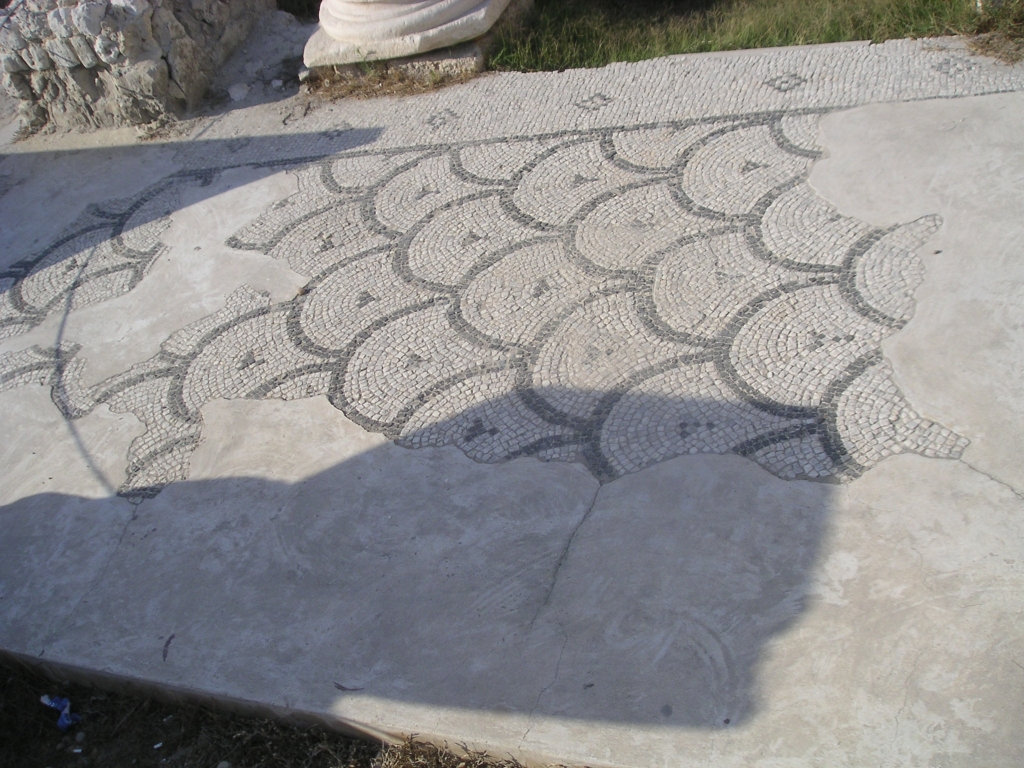 Mosaïque du théâtre de Kom el-Dik à Alexandrie